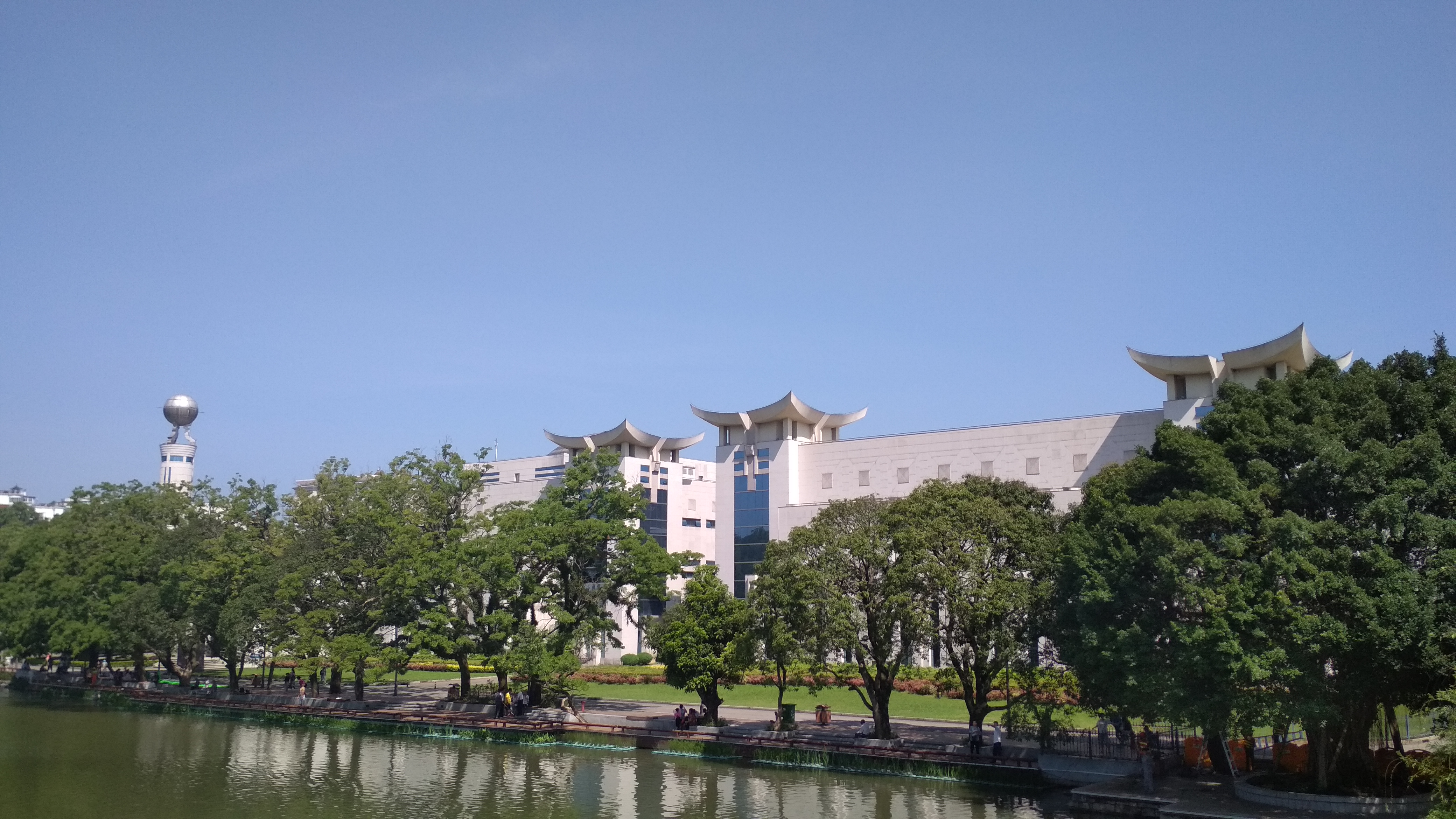 福建博物院外景。